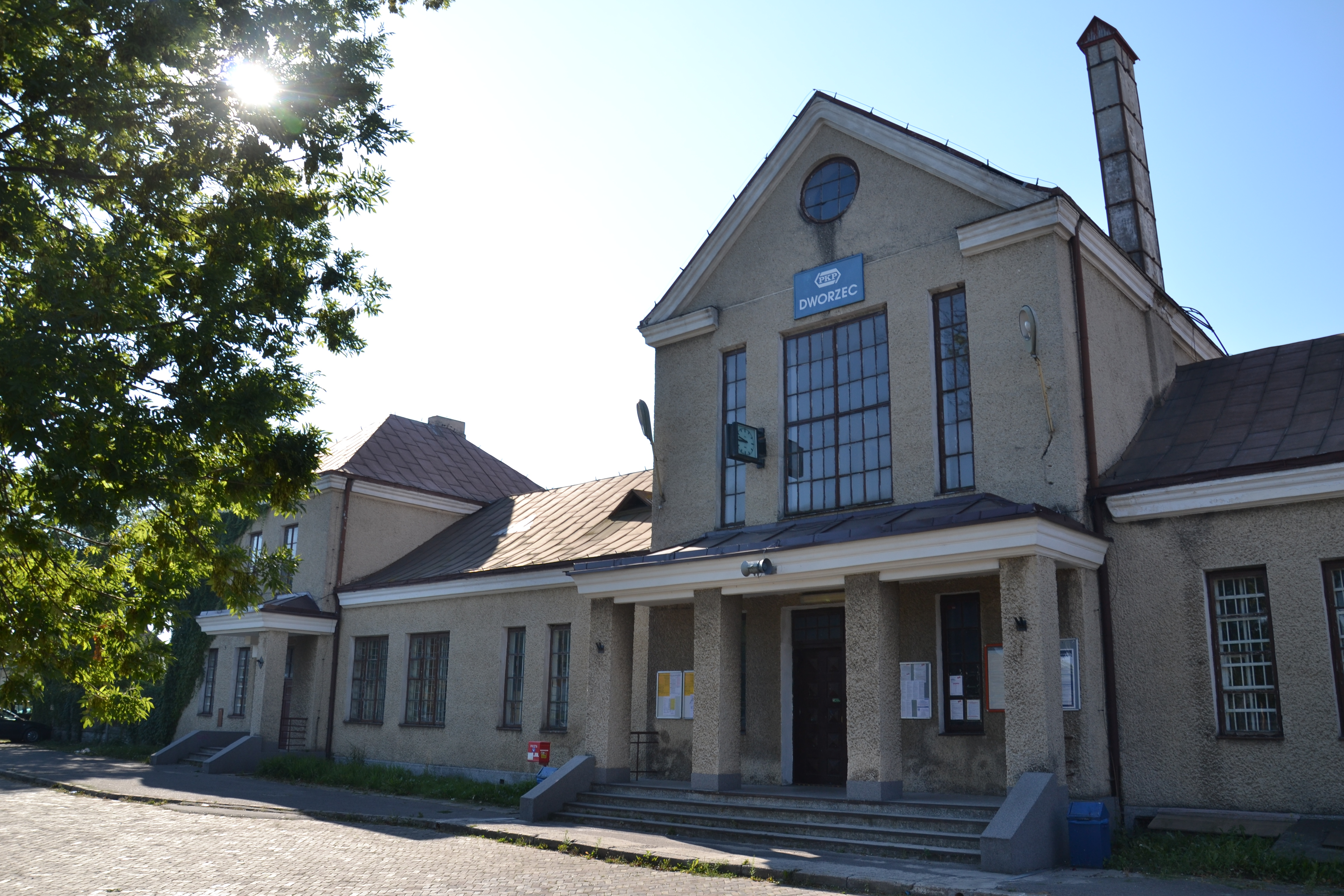 Widok dworca kolejowego w Zamościu od strony miasta This photo was taken during Railway Wikiexpedition 2015 set up by Wikimedia Polska Association in cooperation with Fundacja Grupy PKP. You can see all photographs in category Wikiekspedycja kolejowa 2015.